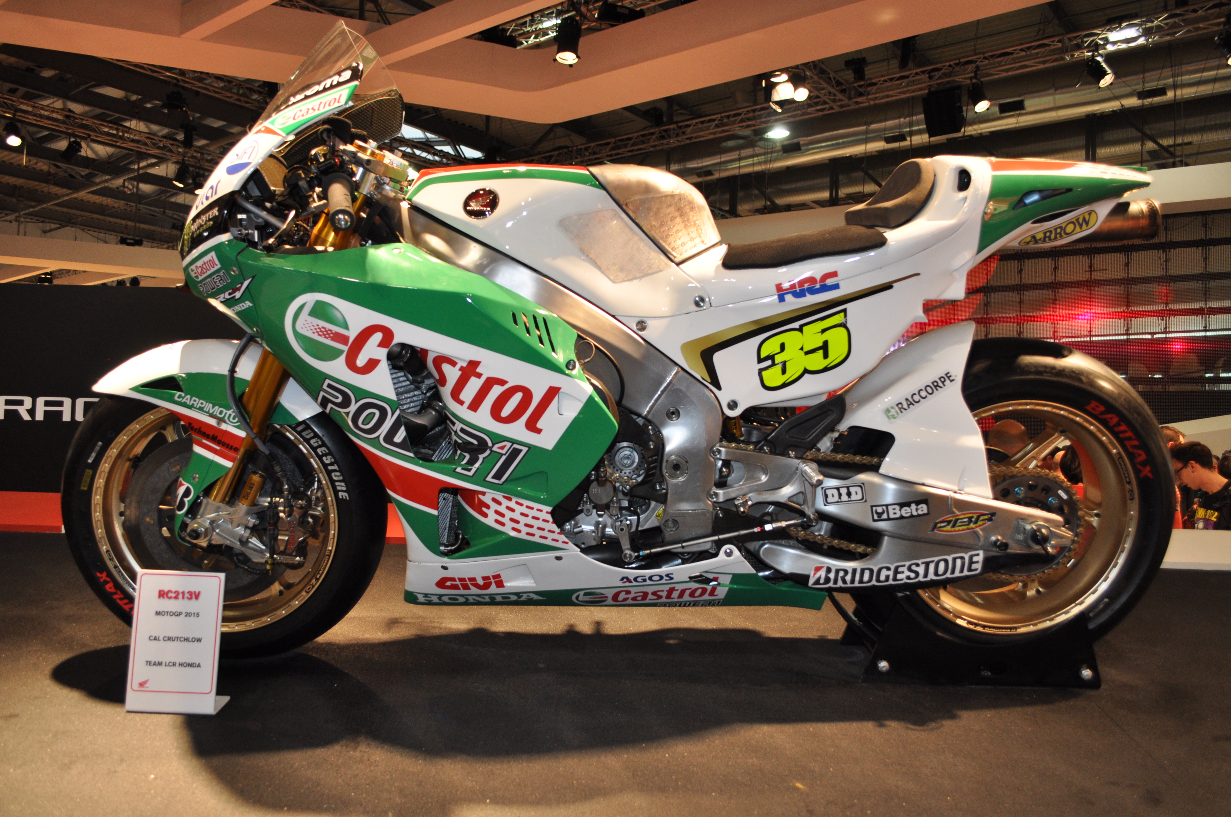 La Honda RC213V del team LCR con cui Cal Crutchlow ha gareggiato durante il campionato del mondo di MotoGP 2015